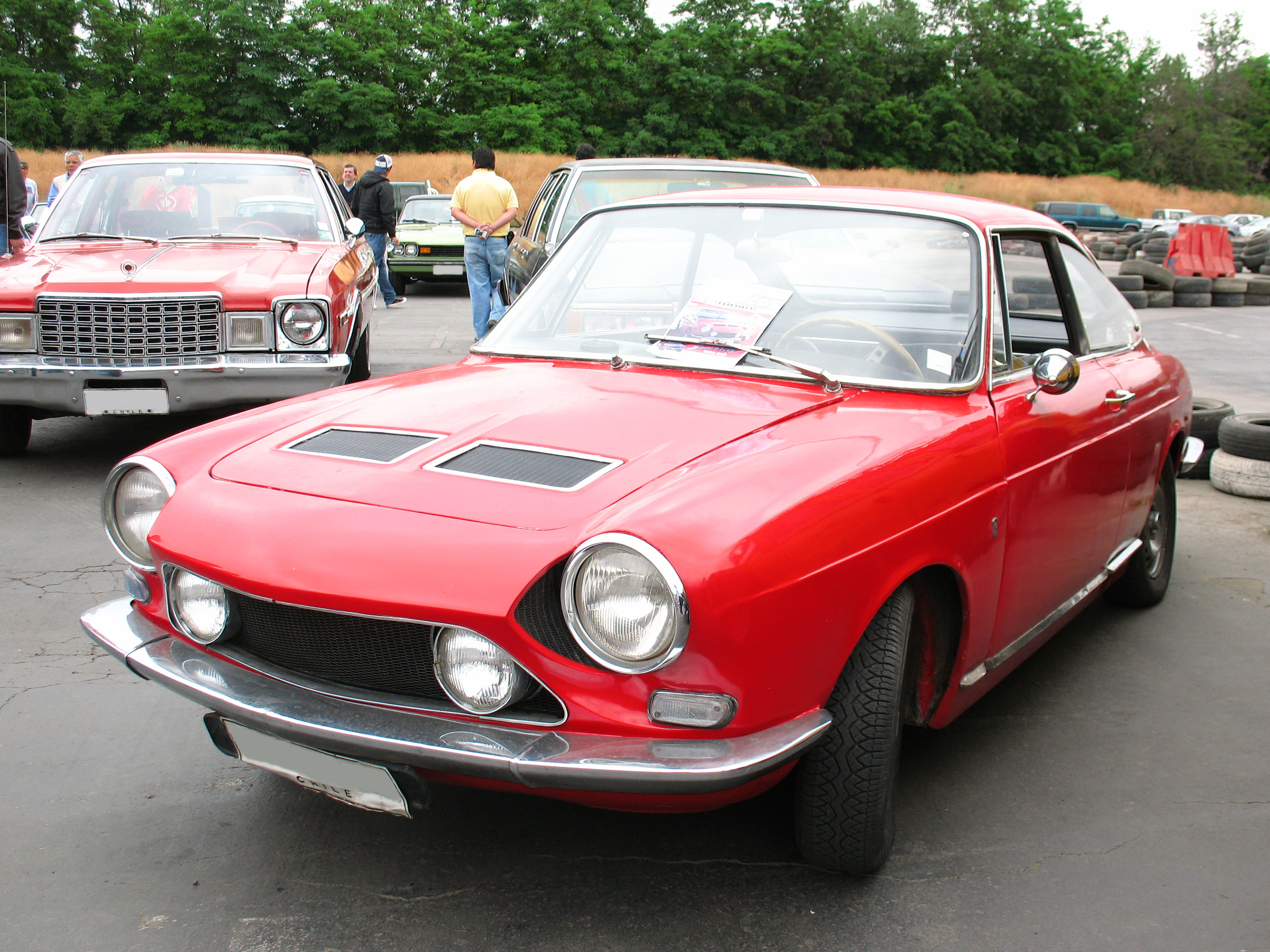 Simca 1200 S 1971